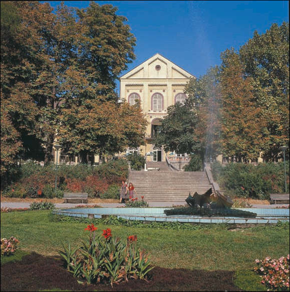 Le parc de la station thermale de Bukovička Banja à Aranđelovac, avec vue sur le palais Staro zdanje.